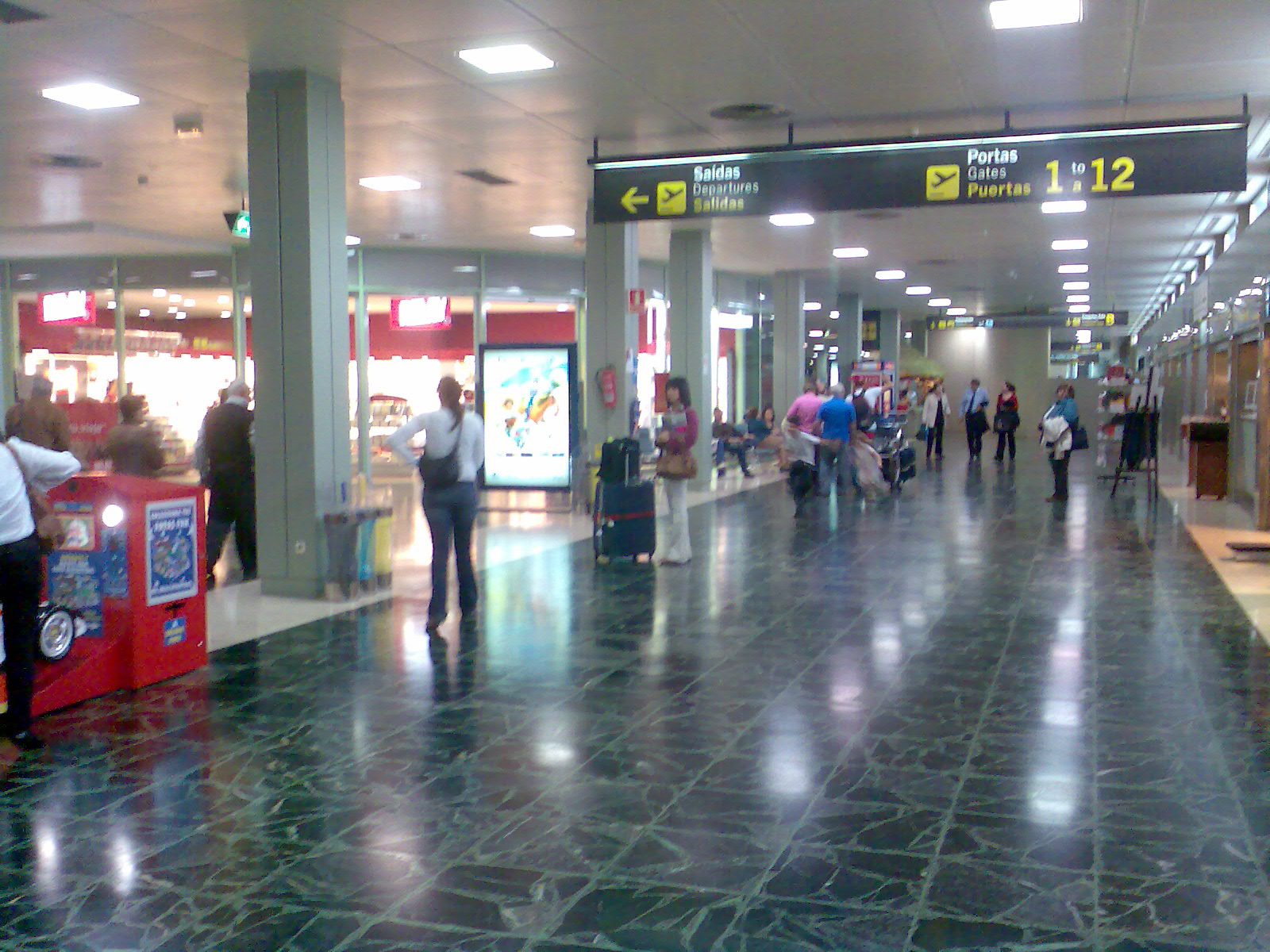 Aeropuerto de lavacolla, Santiago de Compostela